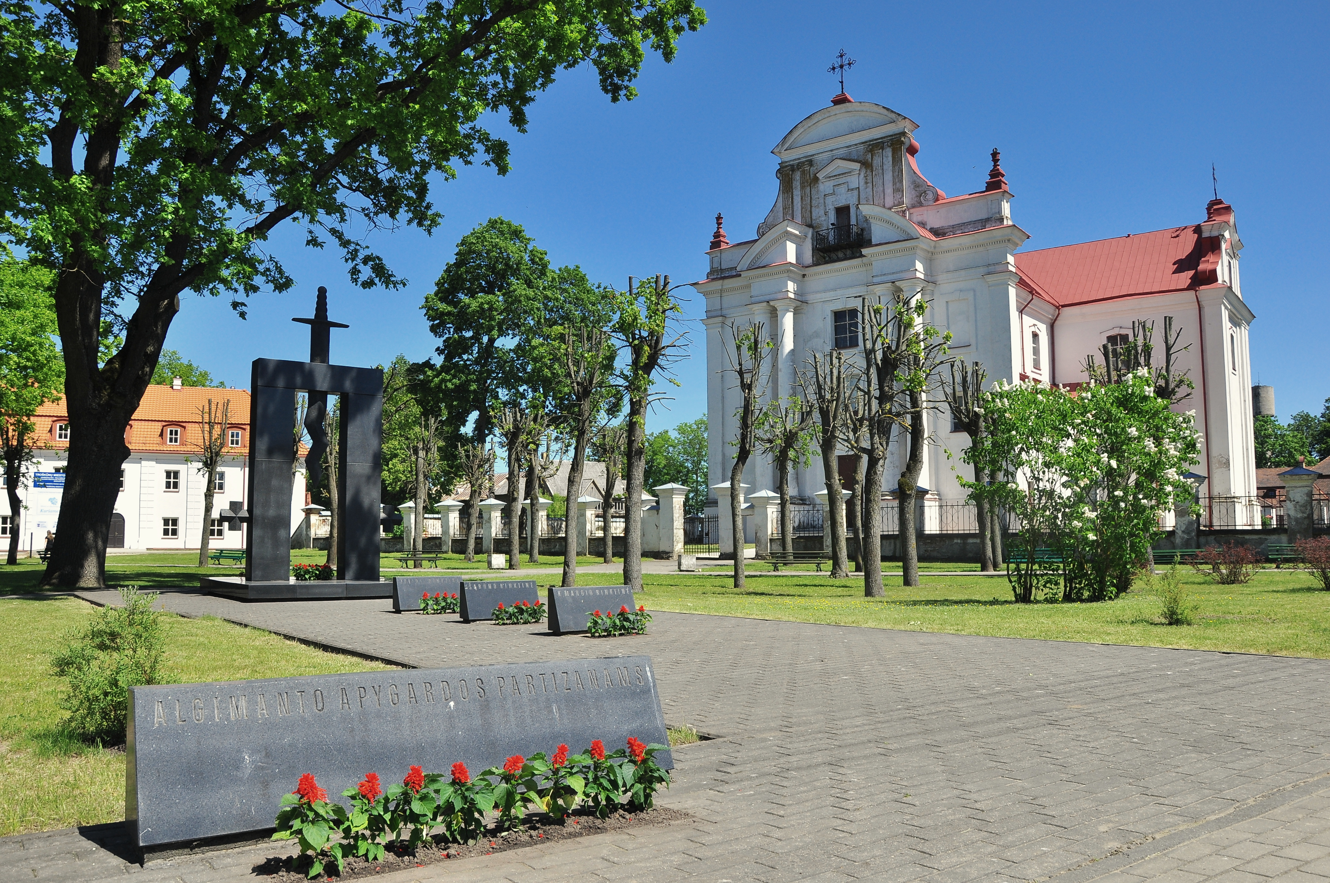 Troškūnai, Lithuania